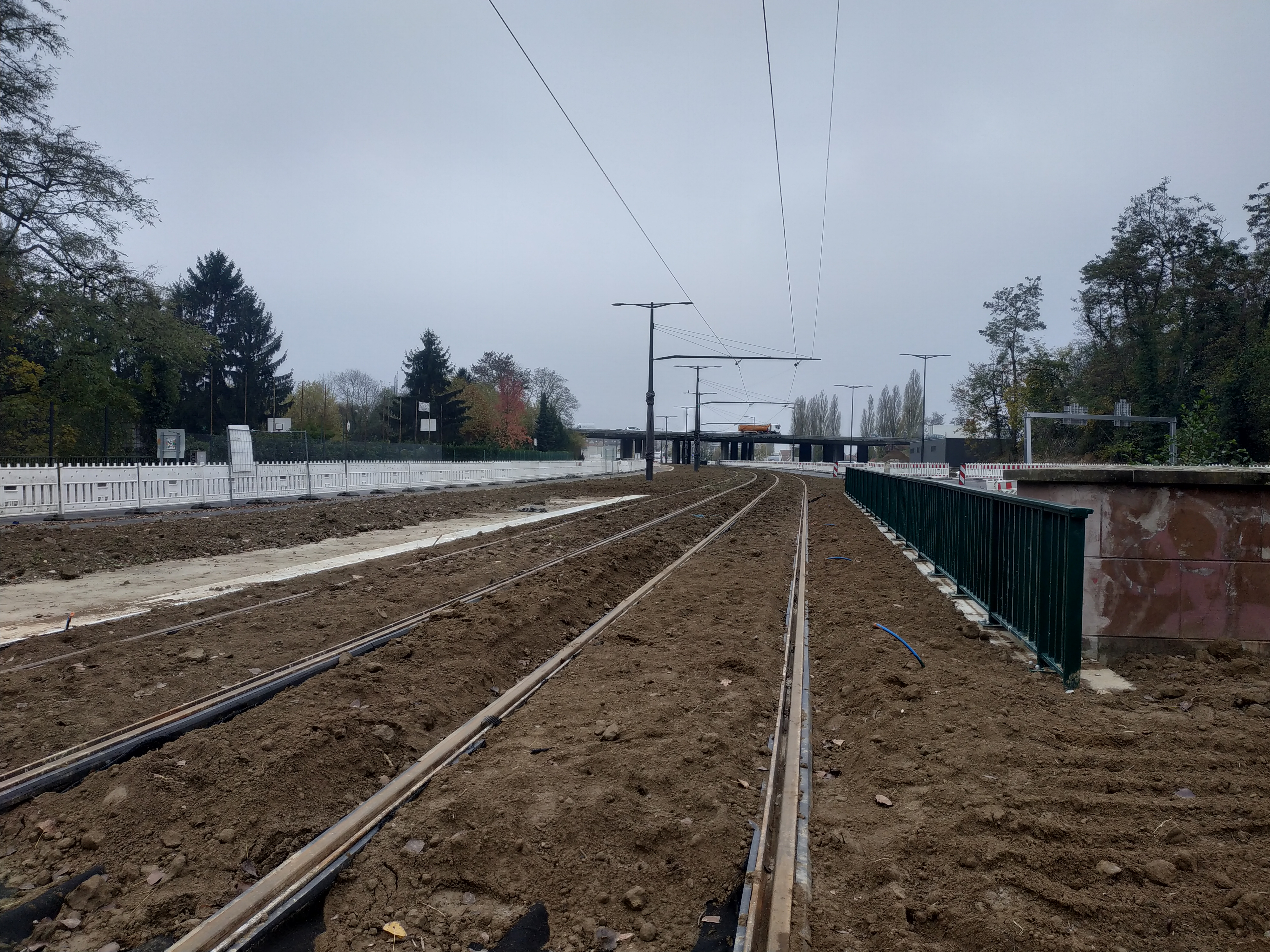 Tour du chantier de l'extension du tram F : Faubourg national jusqu'à Comtes, pour inauguration au printemps 2020. Photos prises dans l'emprise du chantier avec l'accord et l'accompagnement des responsables du chantier.